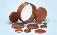 Kupfer-Chrom-Schaltkontakte